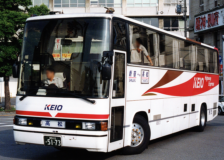 京王帝都電鉄 ハローブリッジ 日野ブルーリボングランデッカ P-RU638BB 日野車体